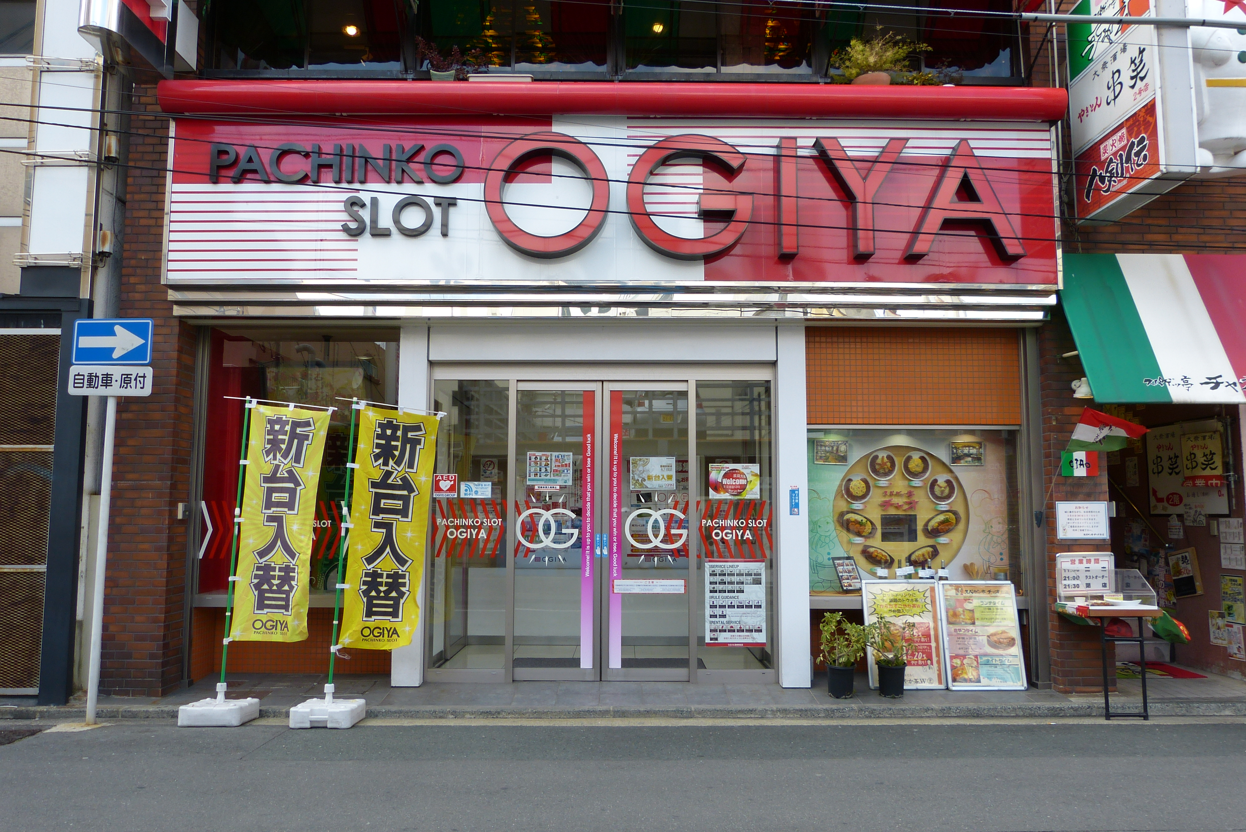 大木屋（パチンコ屋）